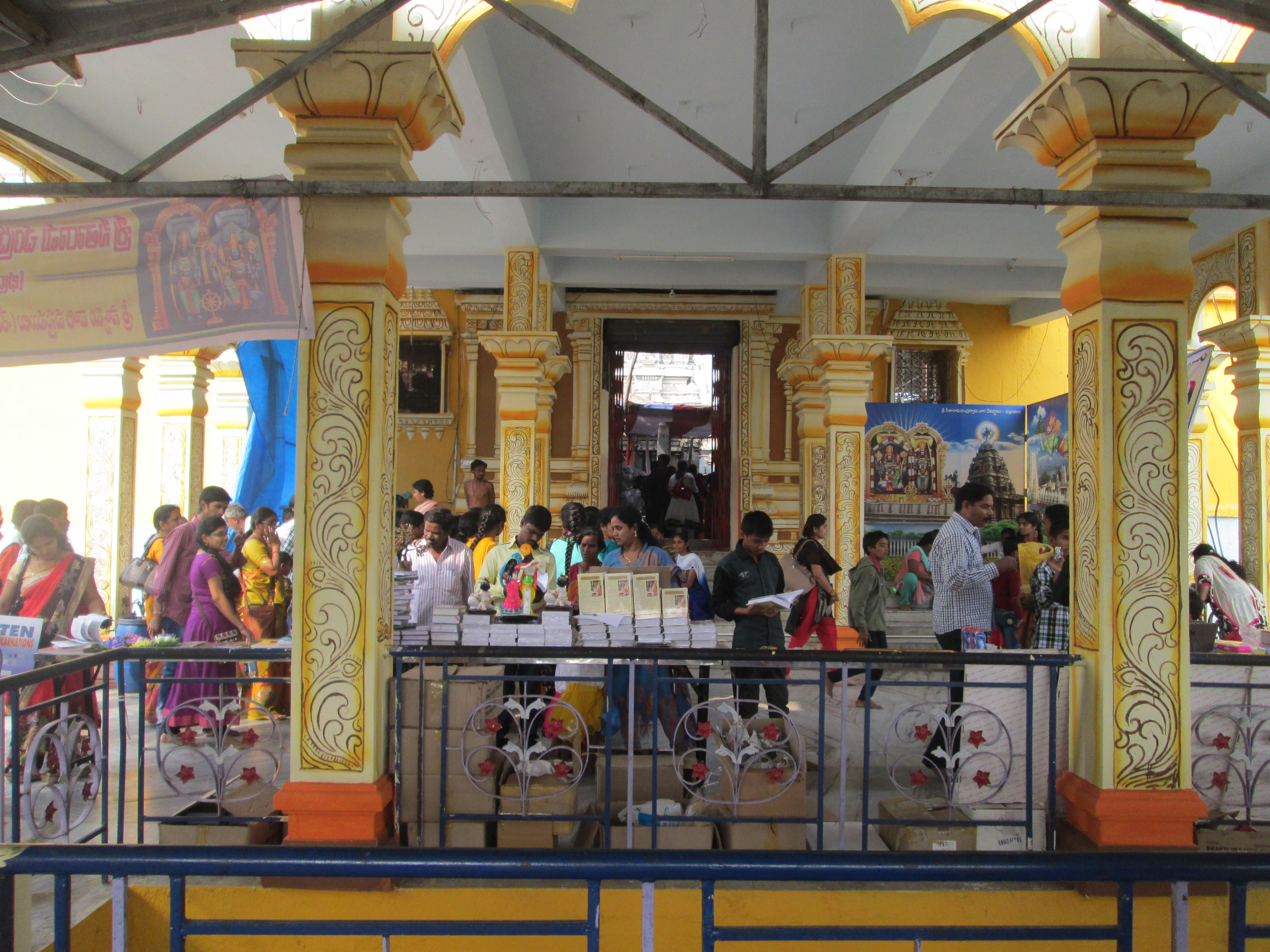 భద్రాచలం శ్రీ సీతారామచంద్ర స్వామి వారి దేవస్థానము